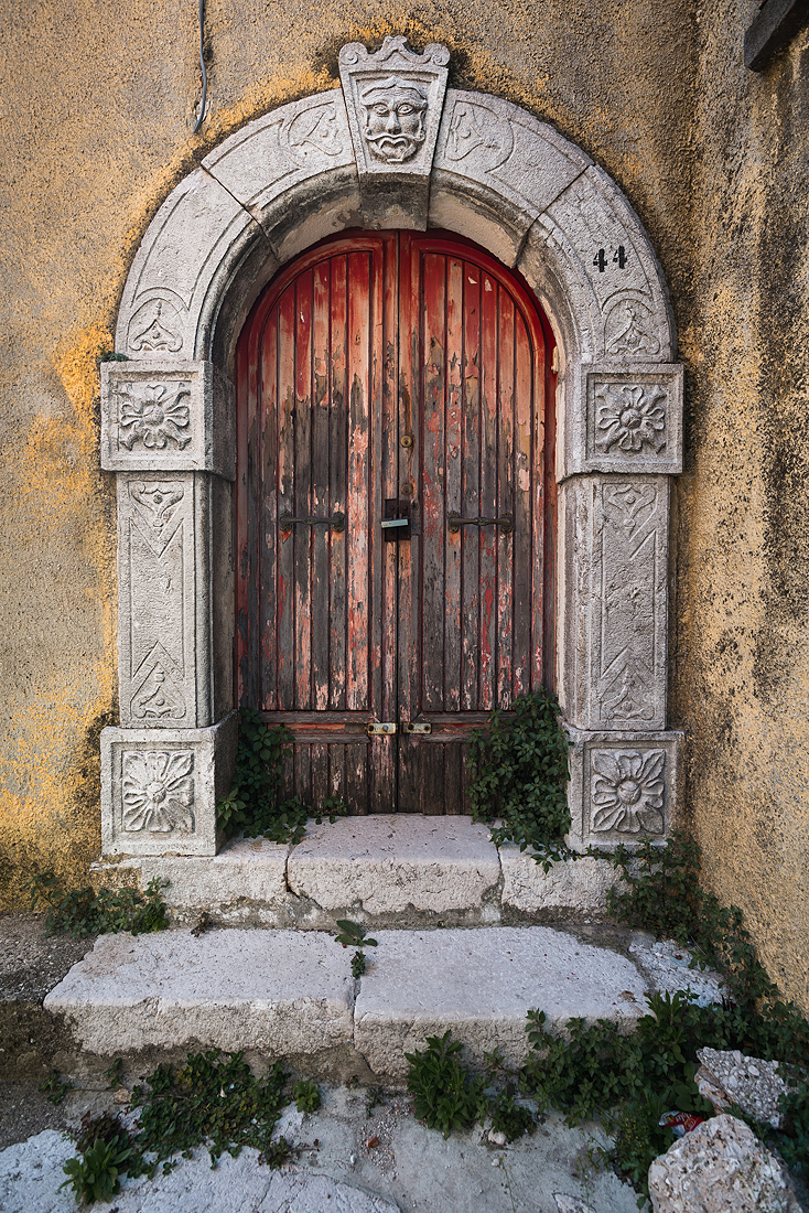 Portale con mascherano del Centro Storico